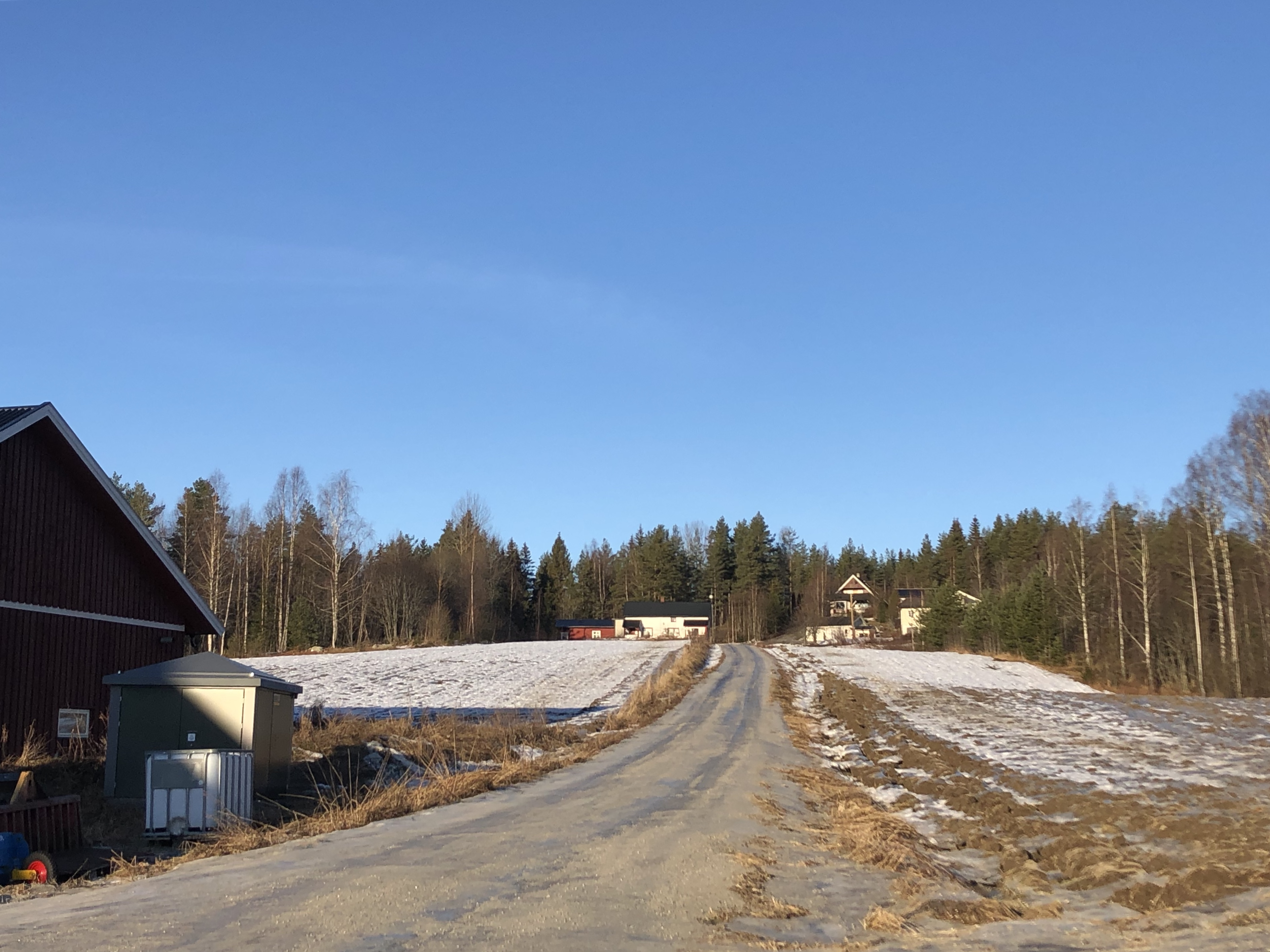 Piperåsveien sett fra Vemeveien, Ringerike